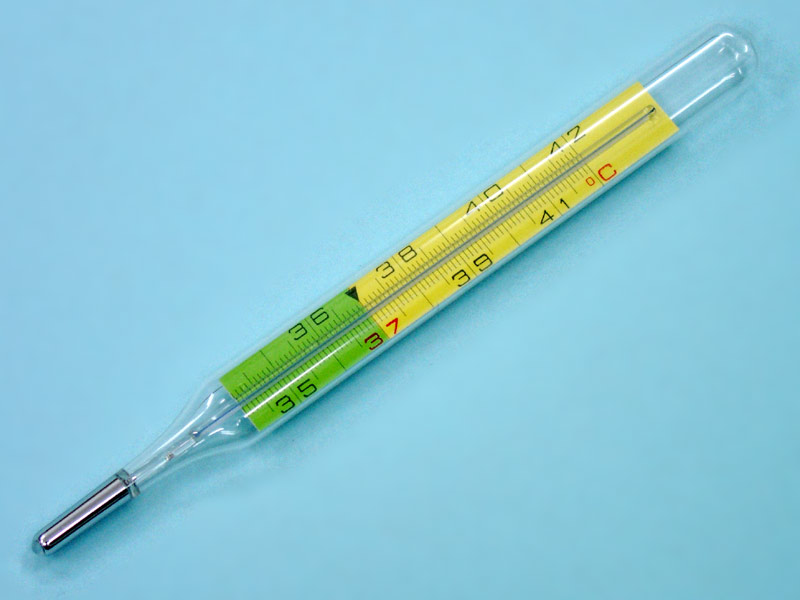 Mein Fieberthermometer